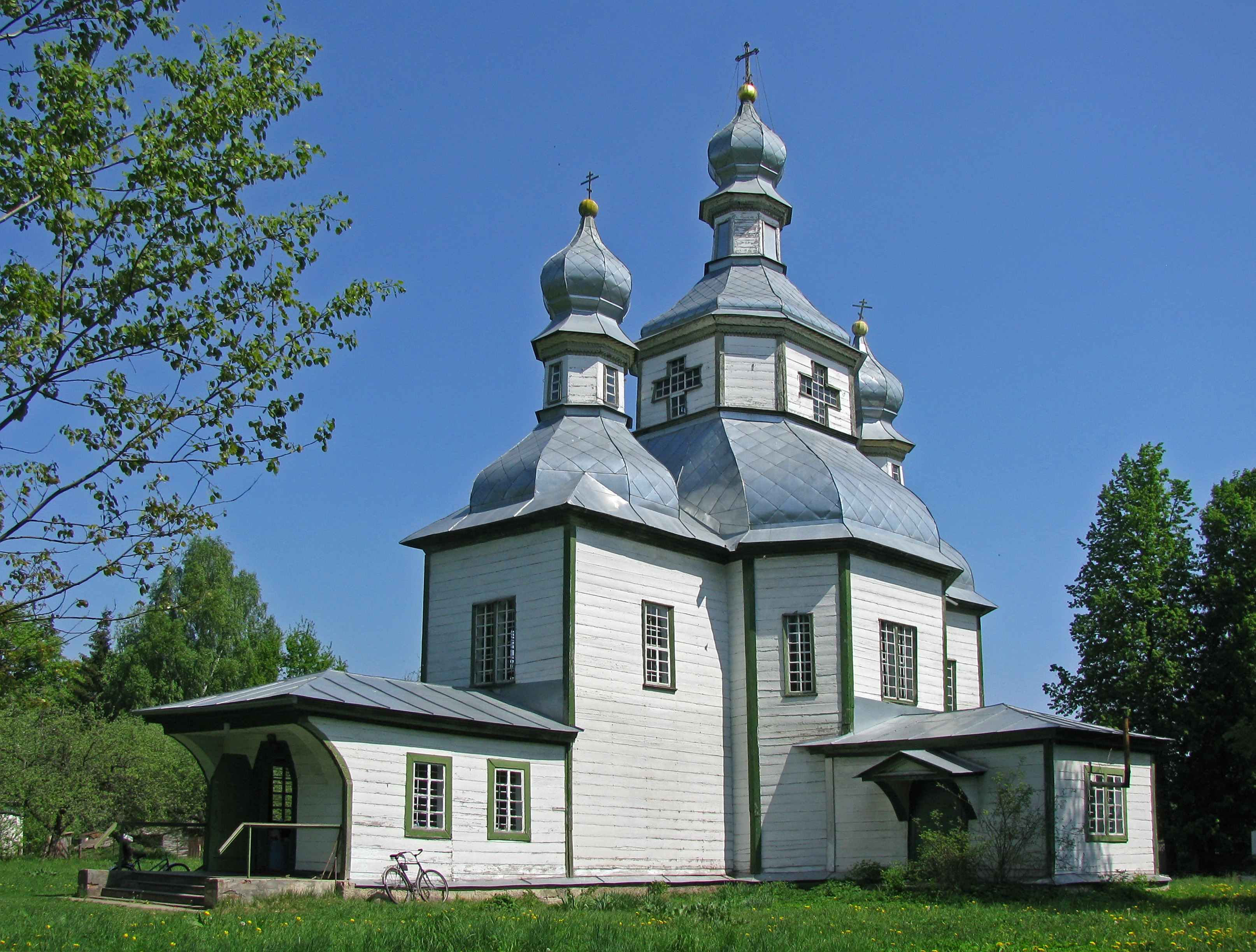 Покровська церква (дер.), с.Синявка